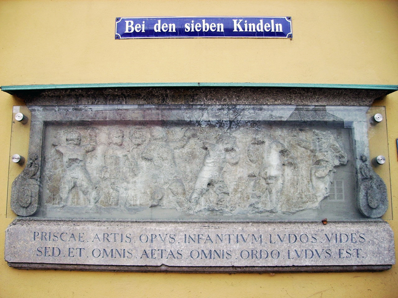 Römisches Fresko "Bei den sieben Kindeln" in Augsburg